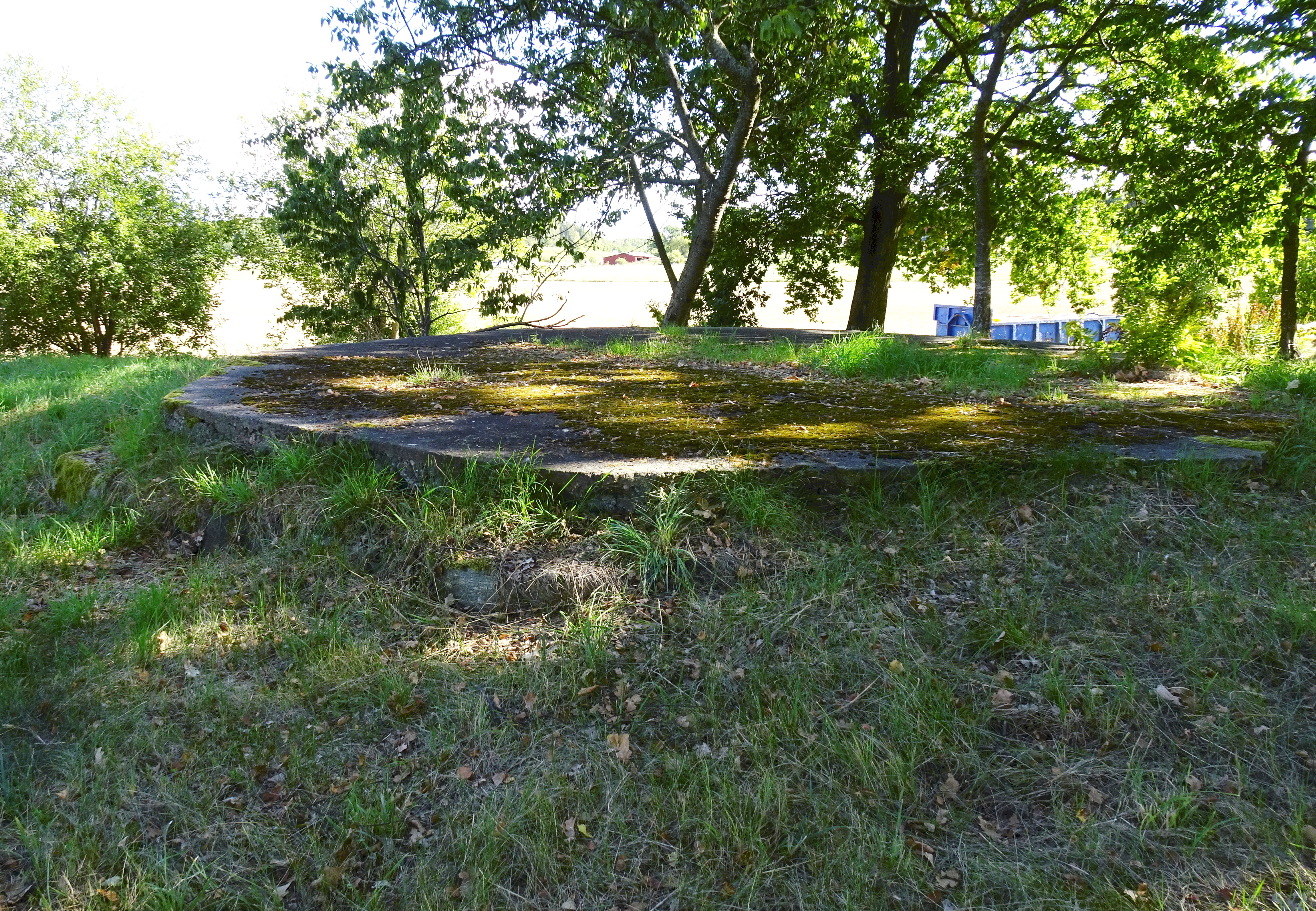 Fundament till Gredby kvarn